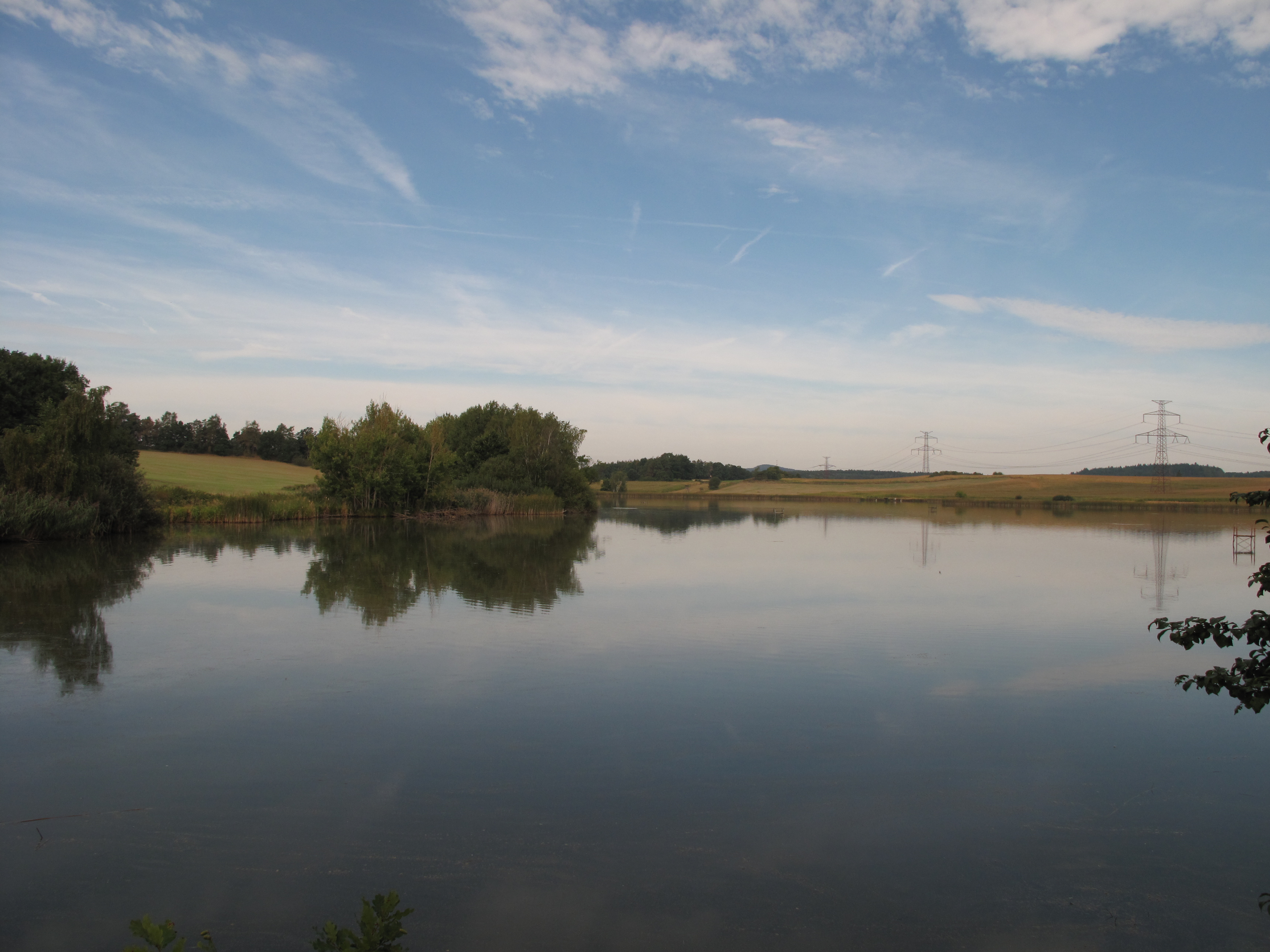 Stará Putim. Okres Písek, Česká republika.